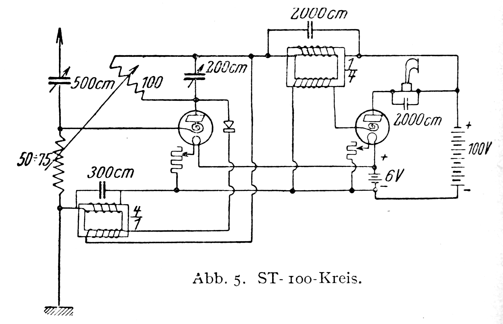 Reflexschaltung aus Radioamateur 1924